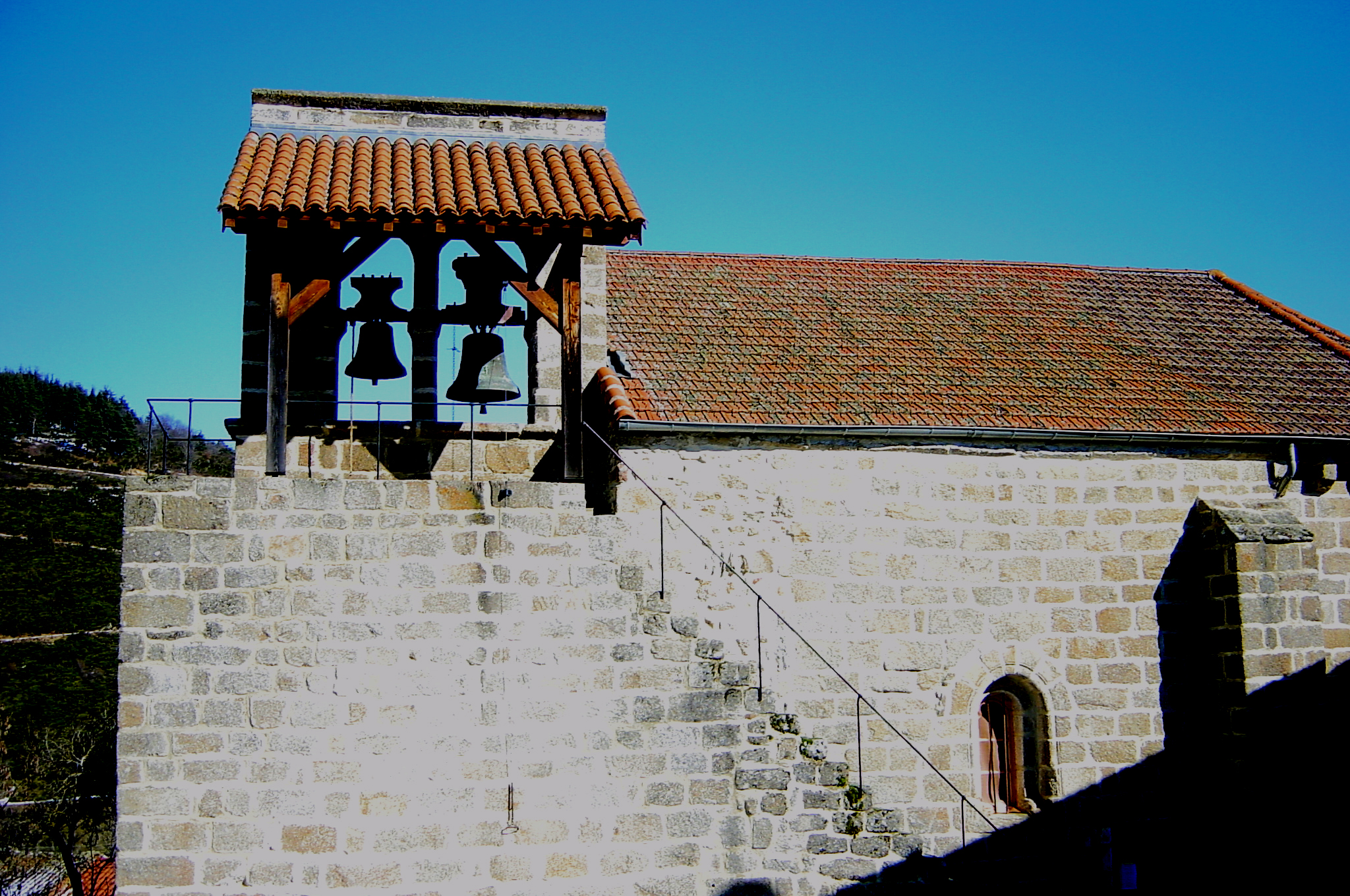 église